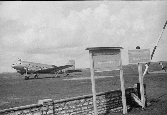 negatief. Dakota op het vliegveld van Kuta